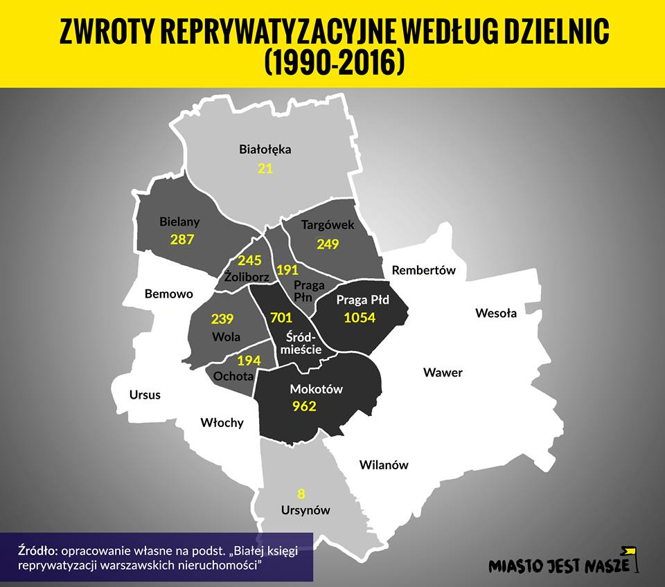 Mapa zwrotów warszawskich nieruchomości w ramach procesu reprywatyzacji w l. 1990-2016 z podziałem na dzielnice